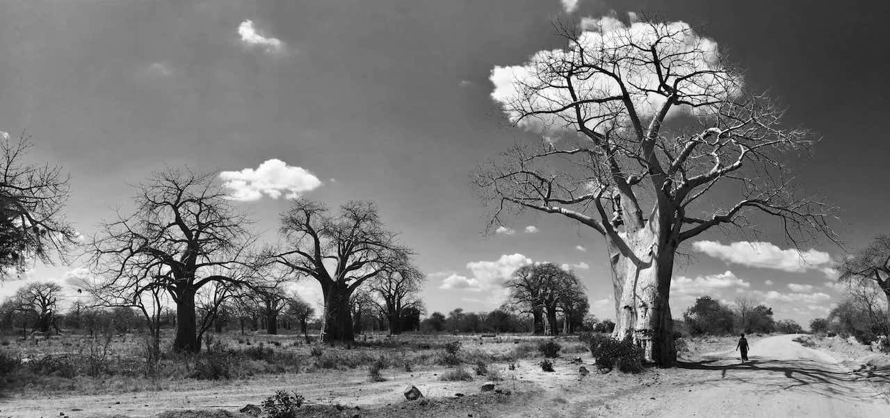 Baobab nella zona di Siavonga in Zambia